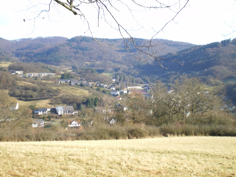 Blick vom Hoelzchen